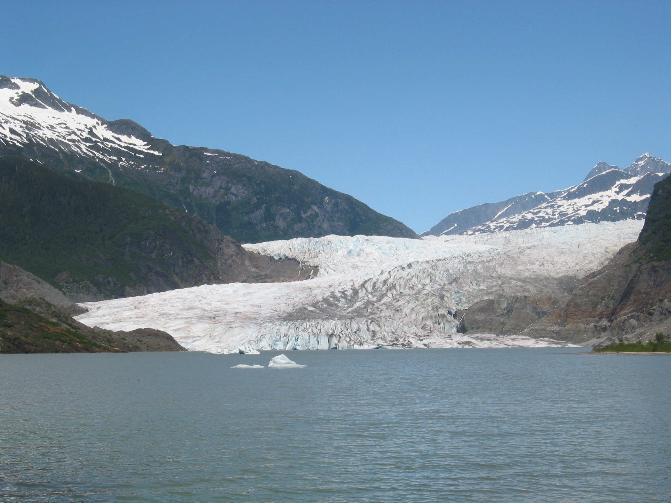 Mendenhall Glacier